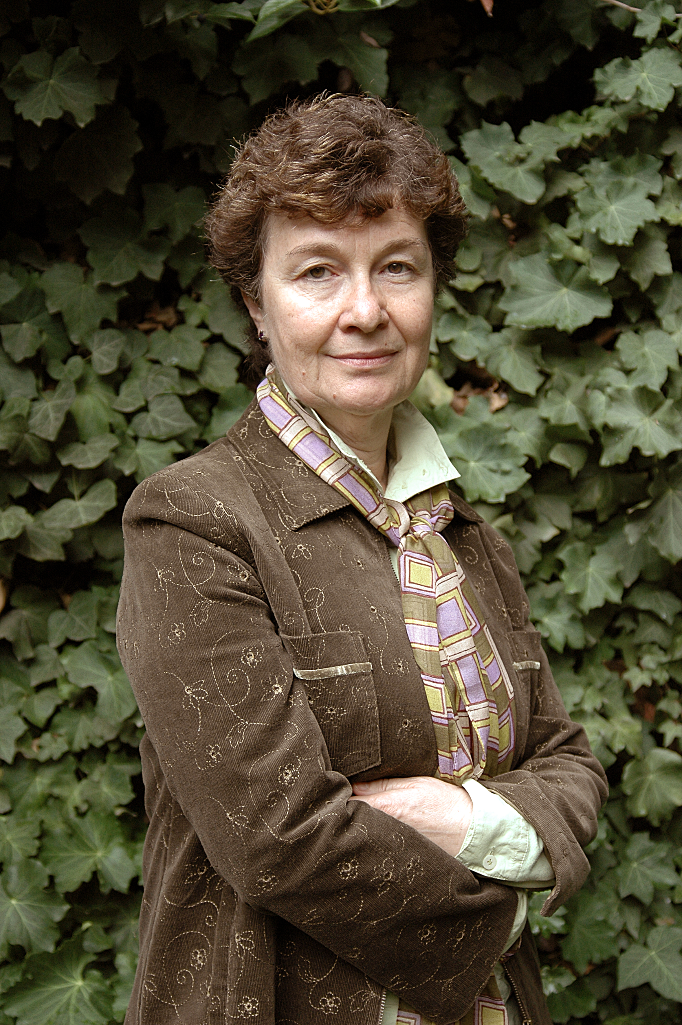 Maria Barbal